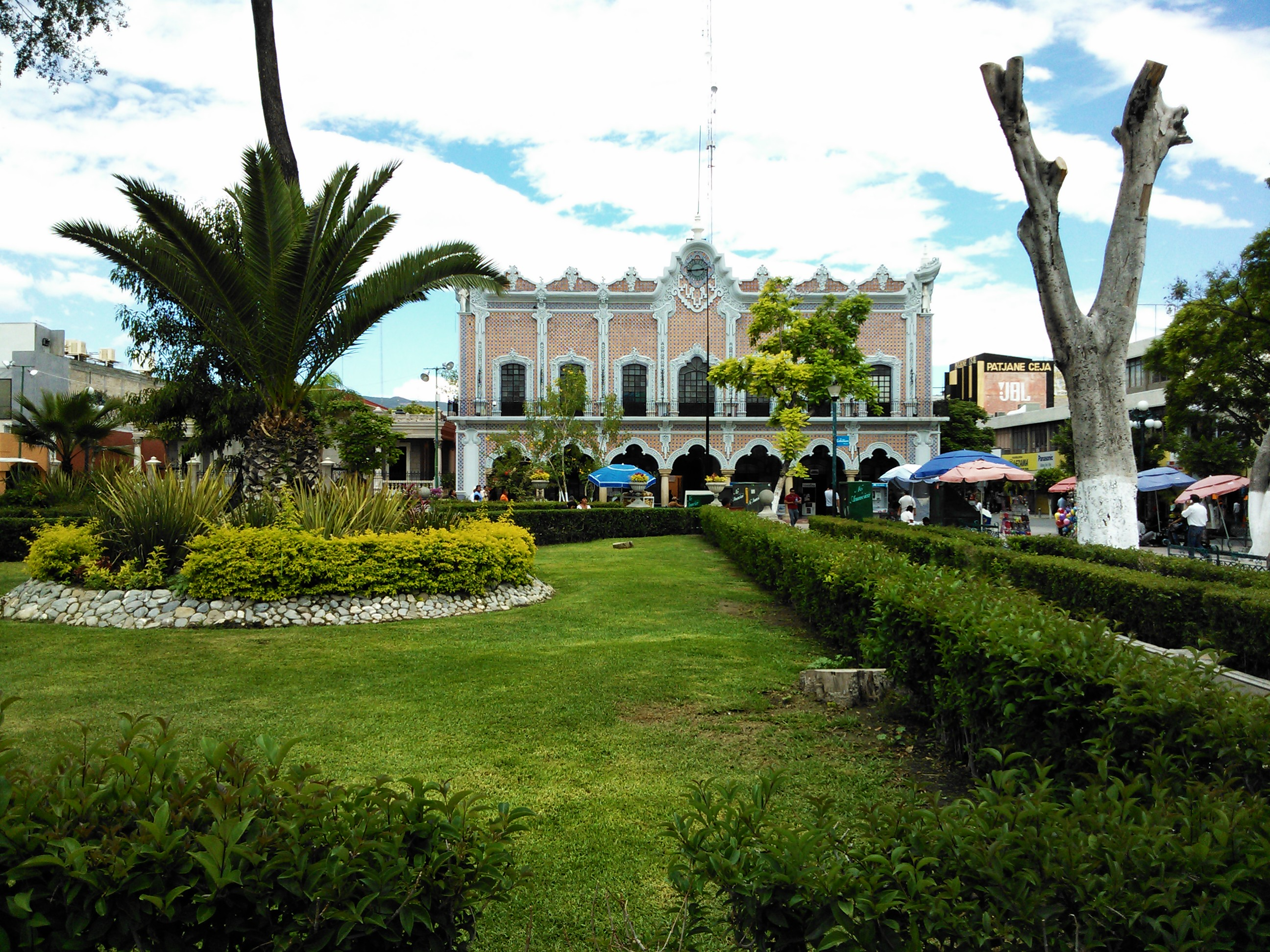 Palacio Municipal vista desde el Parque Juarez